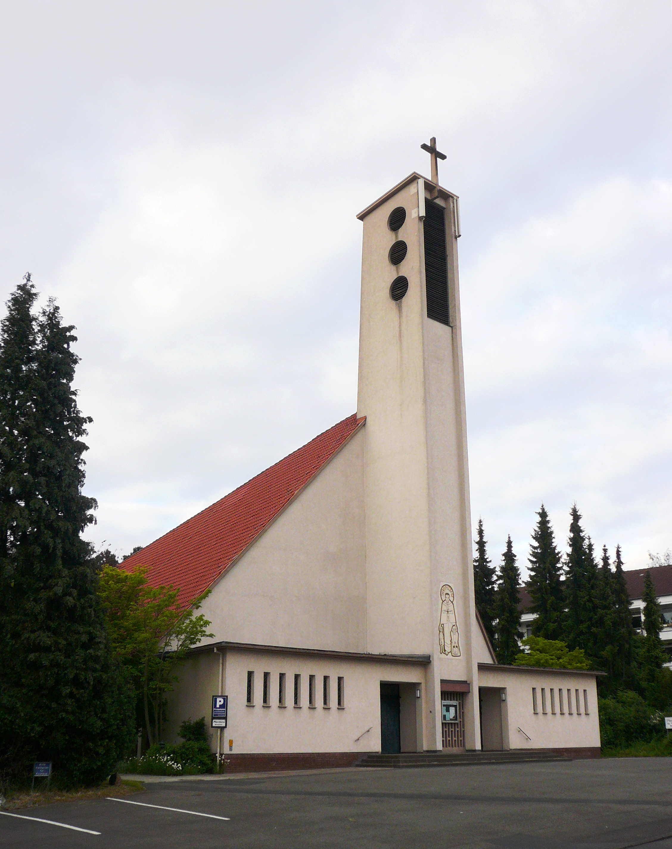 Römisch-katholische Kirche St. Vinzenz, Göttingen-Weende. Erbaut 1960